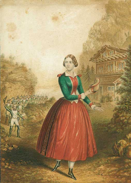 Jenny Lind in La Fille du regiment, Punktierkupfer, 19. Jh. Blattgröße 14,7 x 10,5 cm.